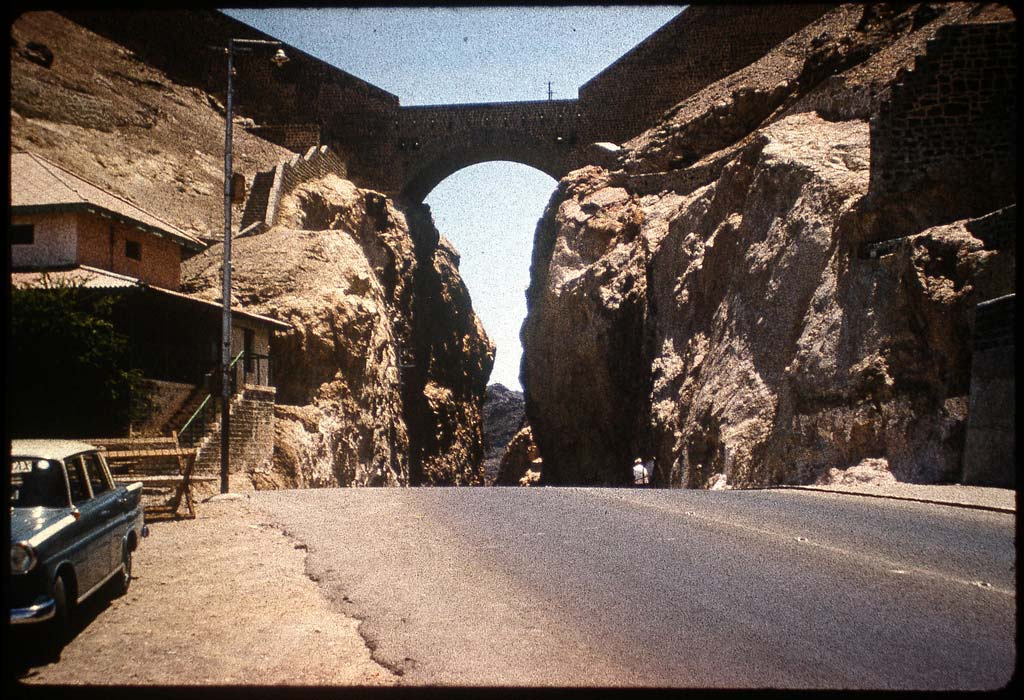 صورة لعقبة عدن من اتجاه المعلا عام 1962